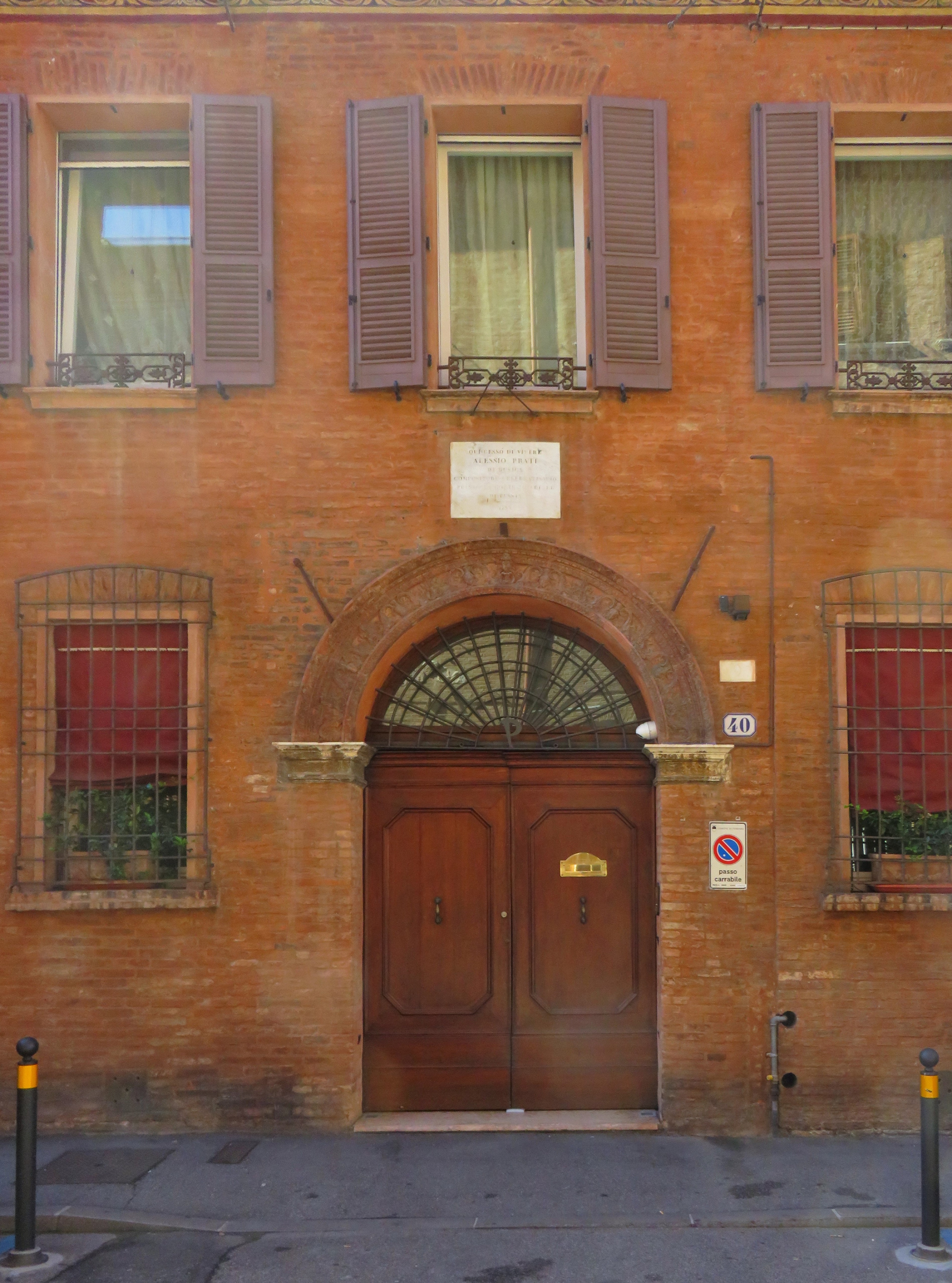 Casa Lampronti in Via Voltapaletto al numero 40, a Ferrara, nella quale morì il compositore Alessio Prati. Il portone di accesso è decorato con un bel motivo ornamentale.